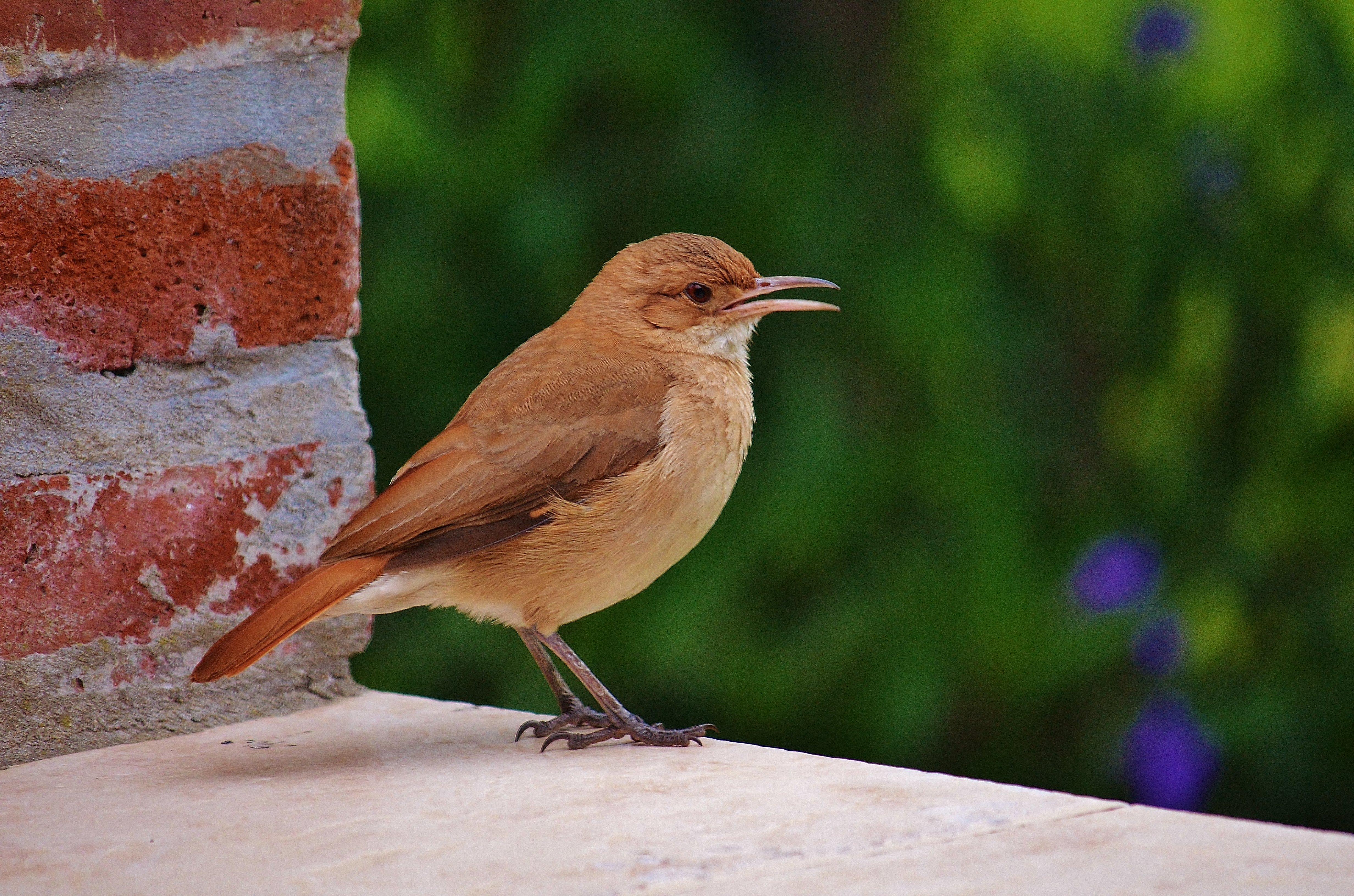 Nuna me canso de admirar al hornero. Simple, lindo, habil y muy trabajador.